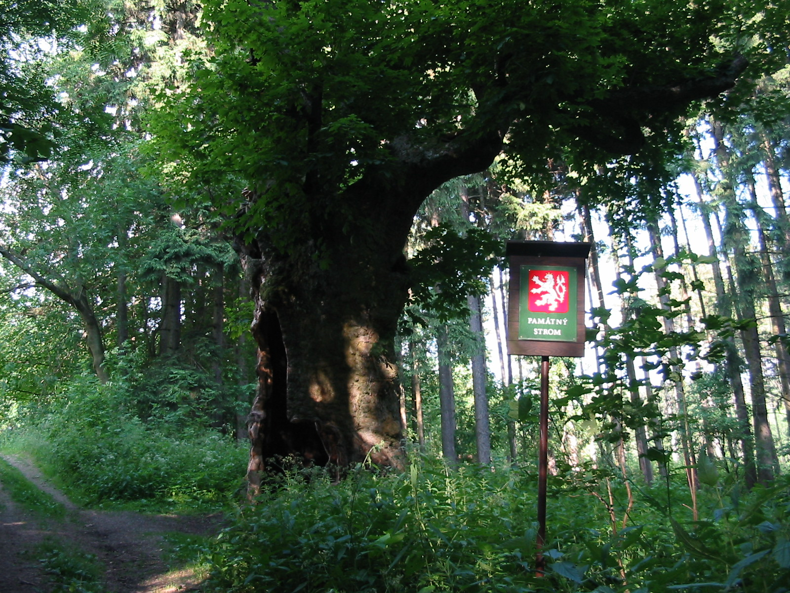 Památný strom u Věstoňovic (okres Třebíč). Obvod kmene 750cm, stáří asi 600 let.